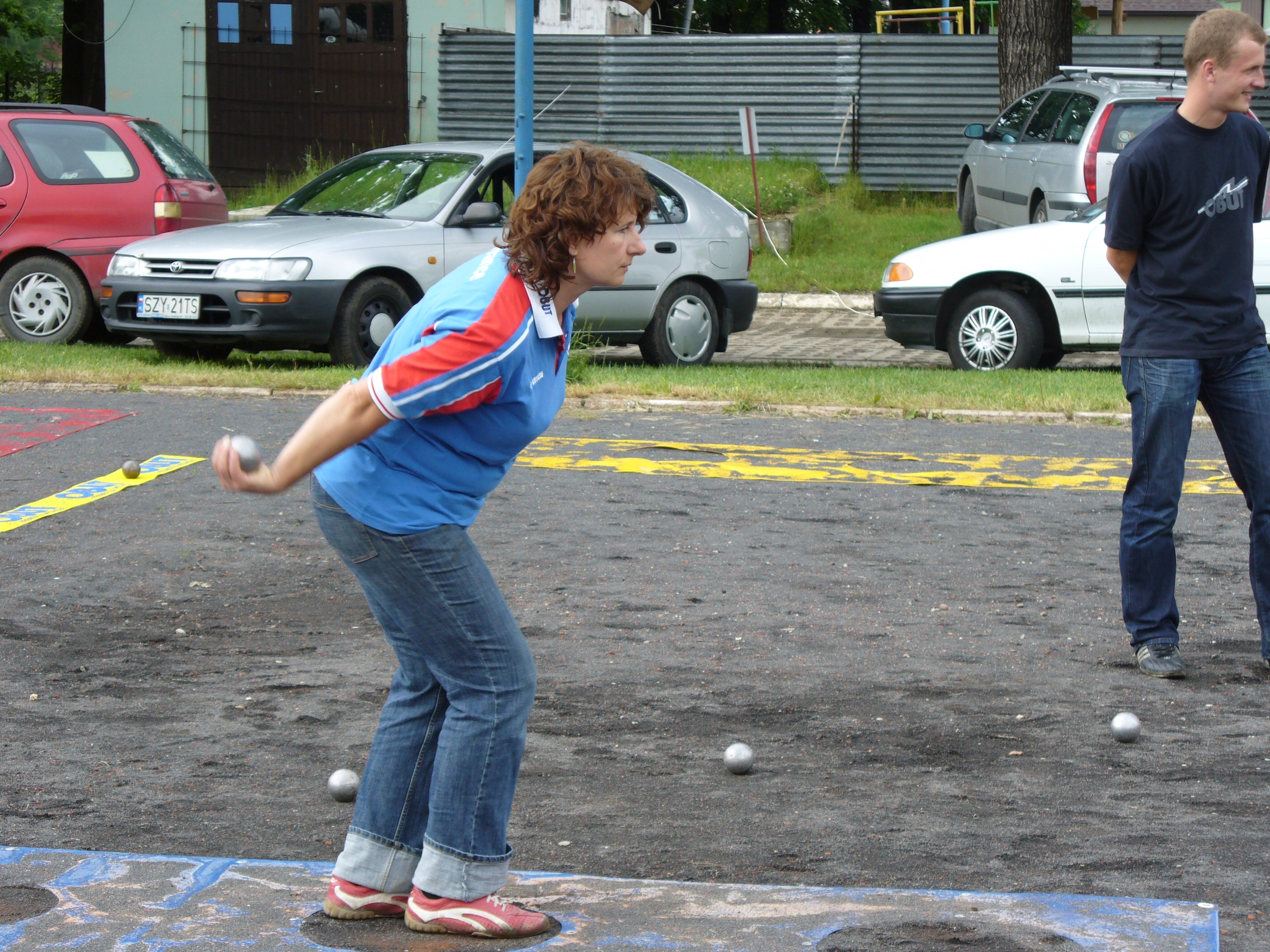 Wioletta Śliż w półfinale konkursu strzału precyzyjnego podczas obchodów stulecia pétanque w Żywcu (2007)